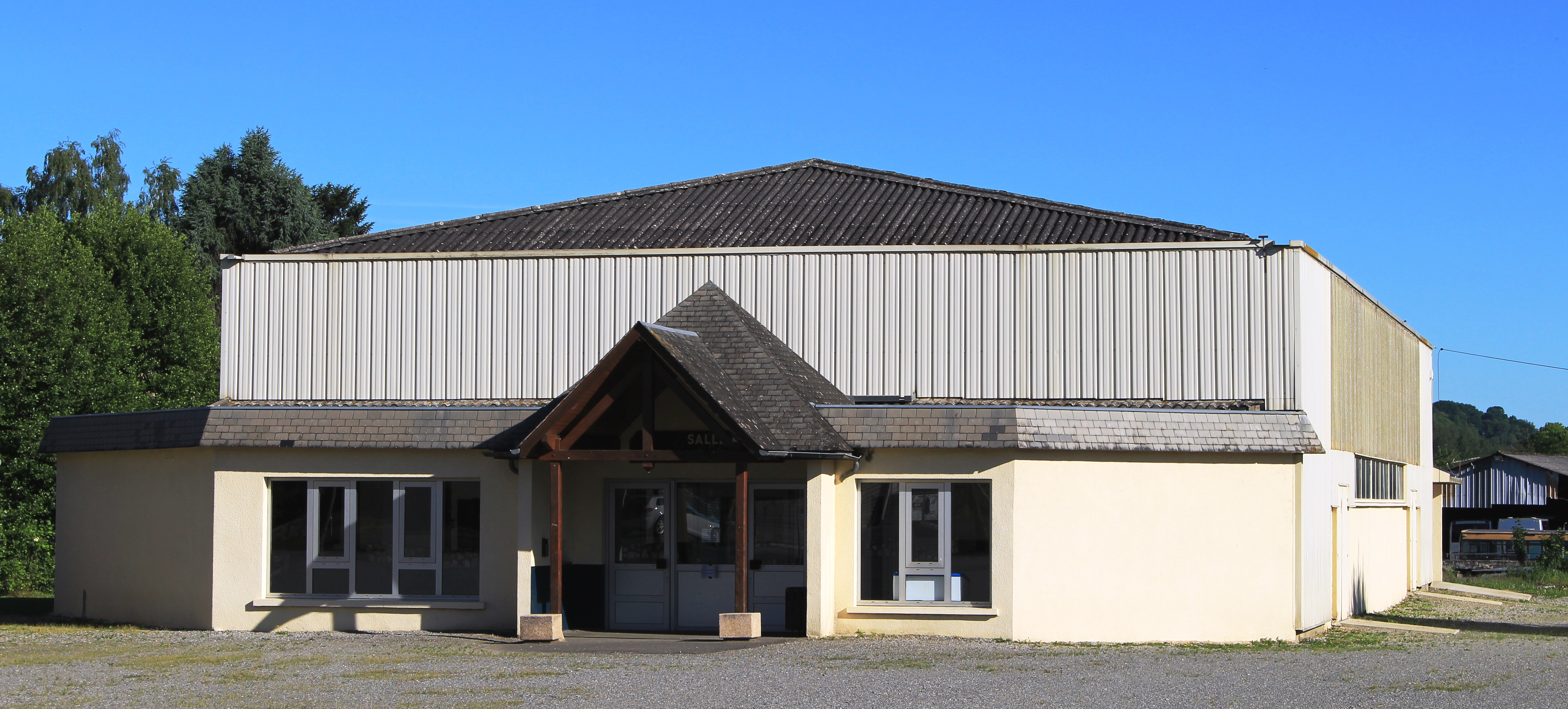 Salle des fêtes de Trébons (Hautes-Pyrénées)